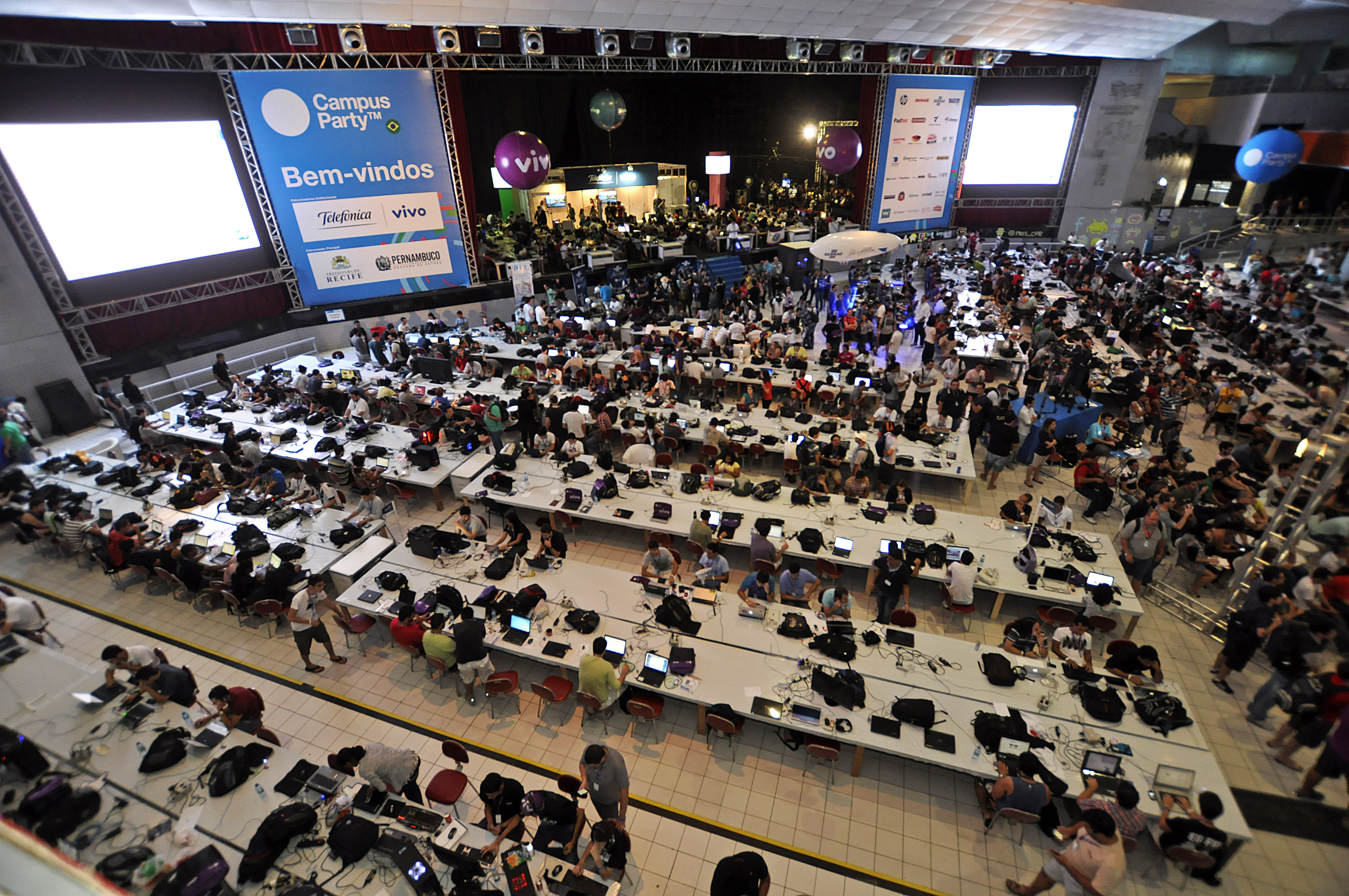 Arena da Campus Party Recife 2012 - Pernambuco, Brasil.